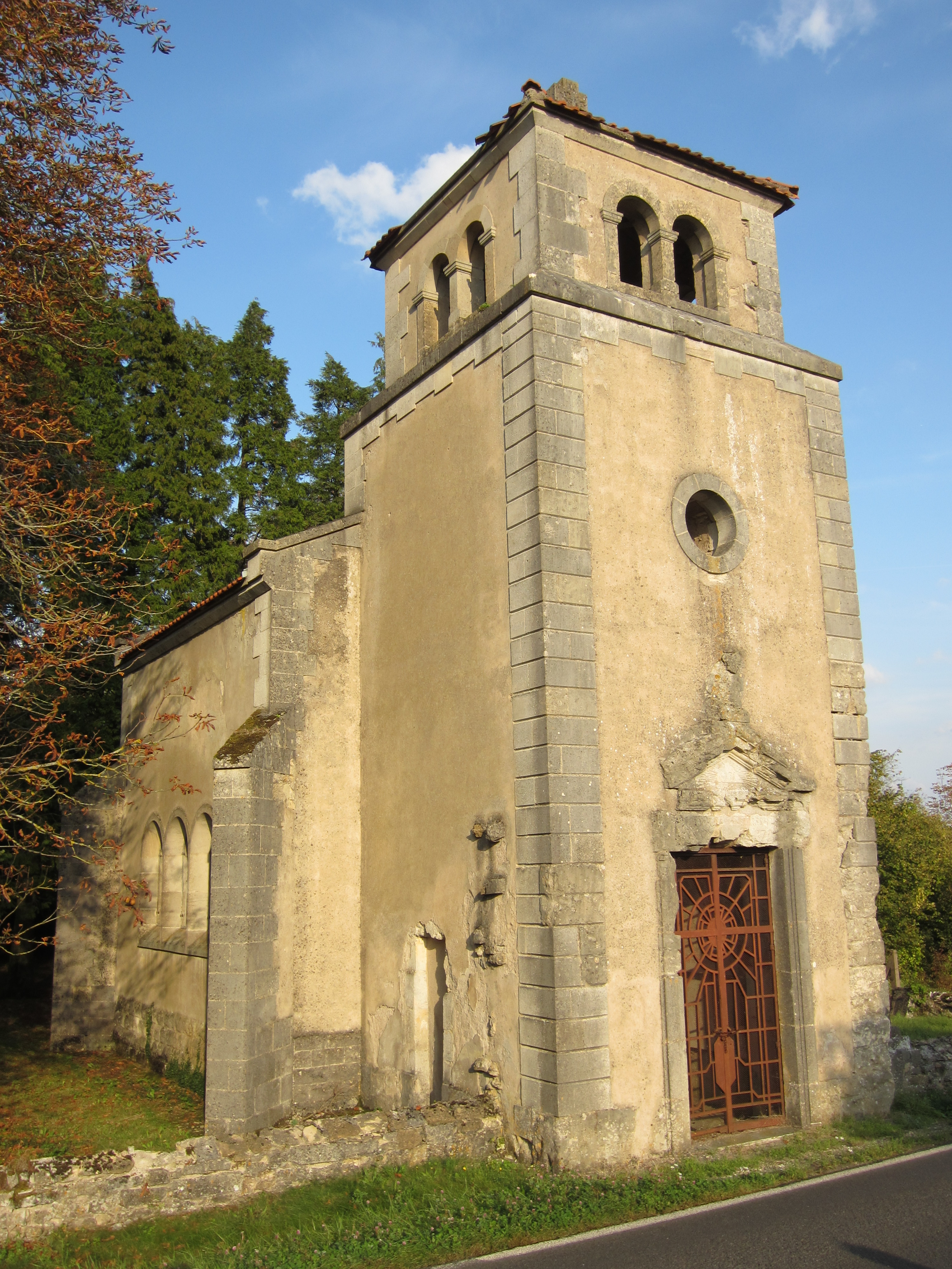 Chapelle Thiaucourt Regneville